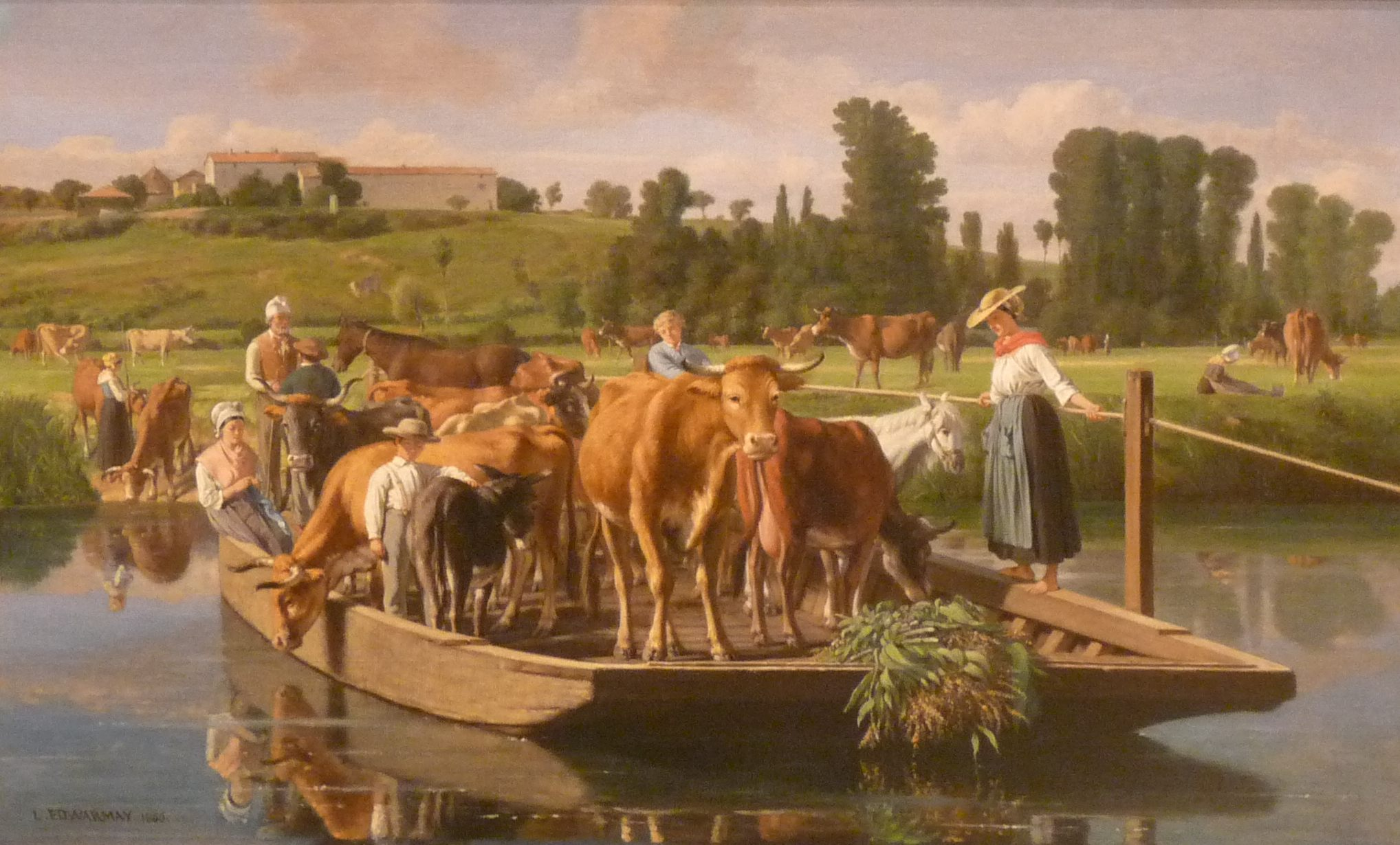 passage du bac de la Charente à Roffit, L-E May, 1866, musée des Beaux-Arts d'Angoulême, France